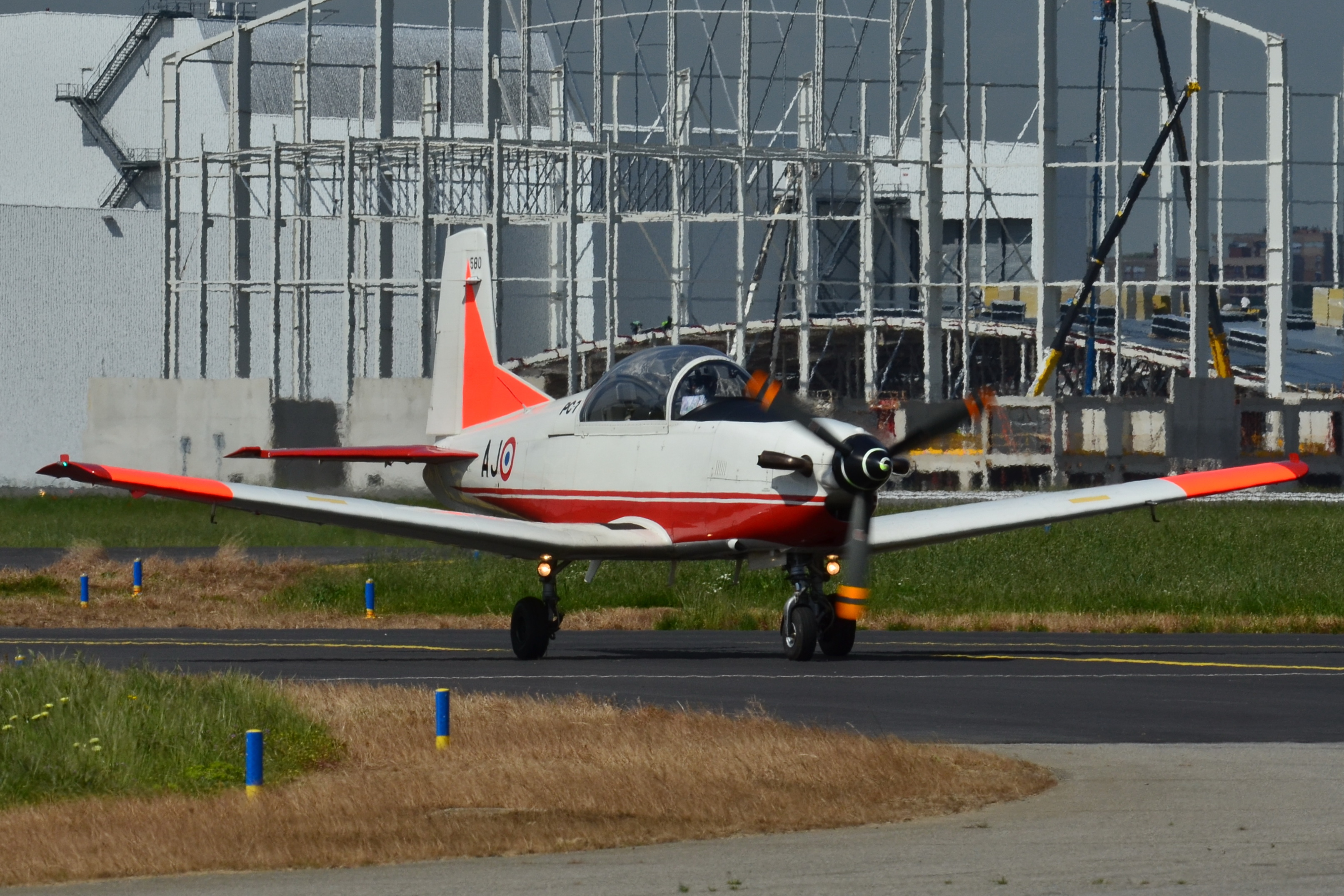 Photo prise à l'aéroport de Toulouse-Blagnac (LFBO) en France. Picture take at Toulouse-Blagnac Airport (LFBO) in France.